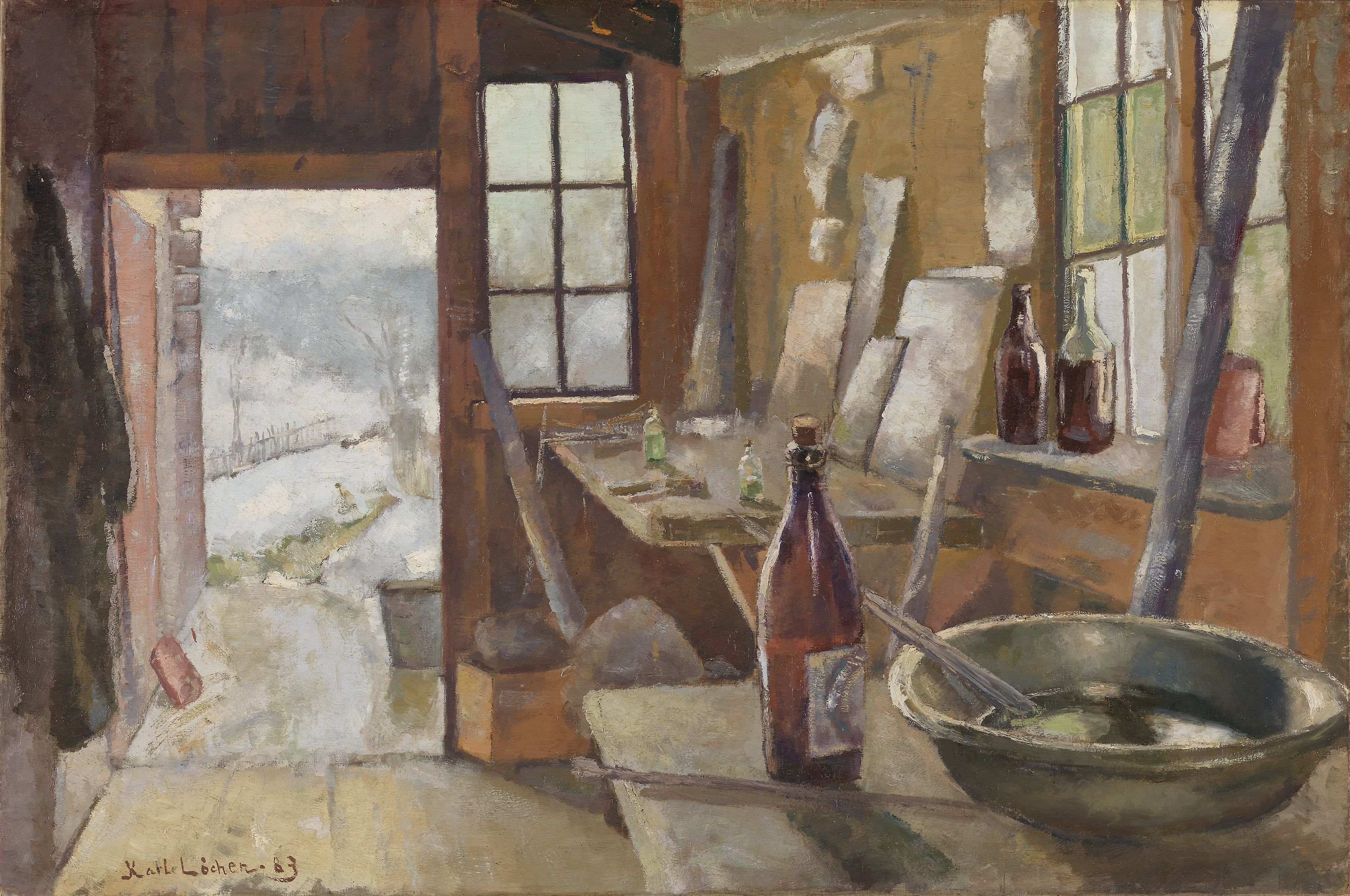 Norwegian: Malerskolens atelier, Modumtitle QS:P1476,no:"Malerskolens atelier, Modum" label QS:Lno,"Malerskolens atelier, Modum"